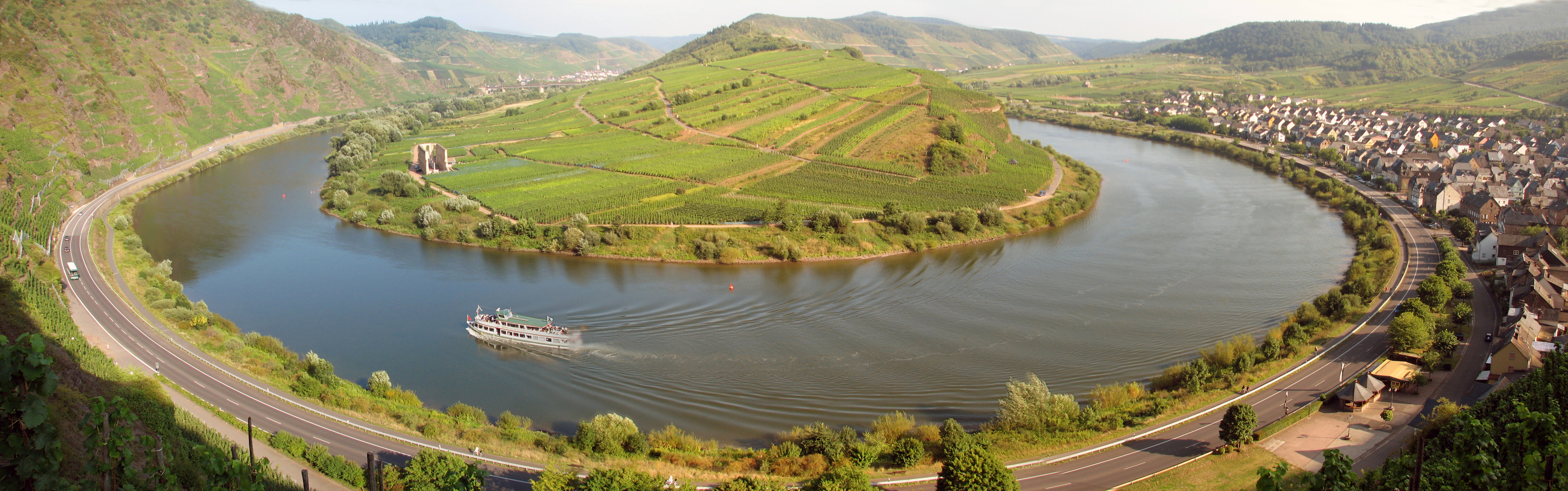 Moselschleife bei Bremm im Abendlicht, fotografiert vom Calmont aus, Europas steilstem Weinberg